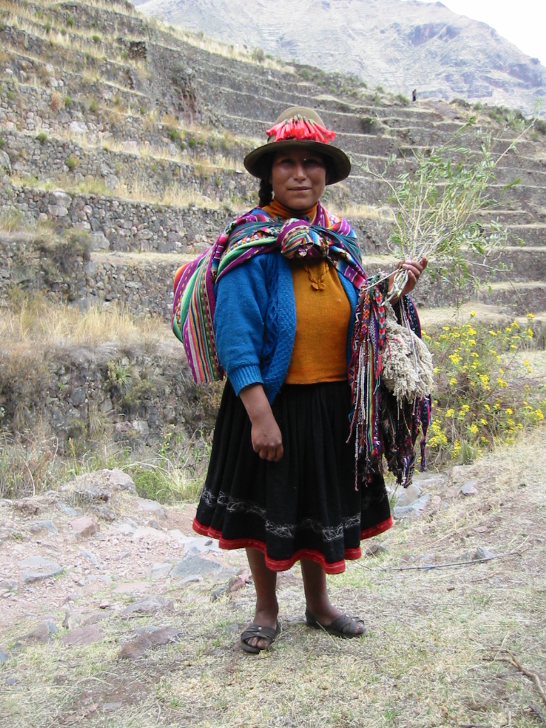 Ketschua-Frau in Peru 2004